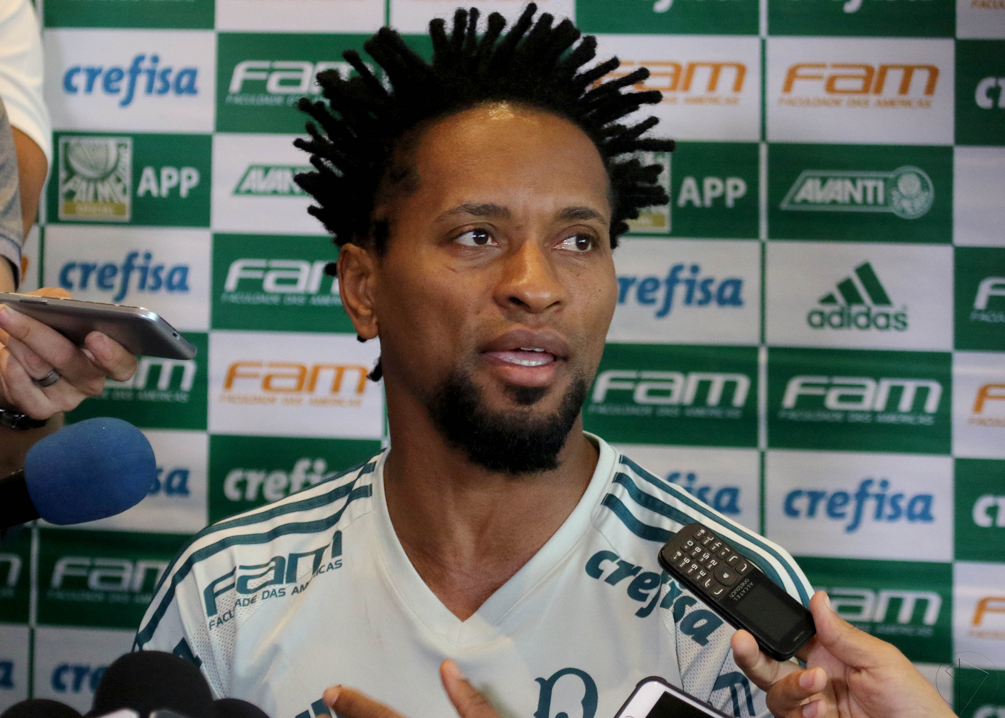 Guayaquil, martes 04 de julio del 2017 (Andes).-Ze Roberto, jugador del equipo brasileño Palmeiras, en rueda de prensa se refirió al partido de mañana frente a Barcelona por los octavos de la Copa Libertadores. Foto:Andes/César Muñoz